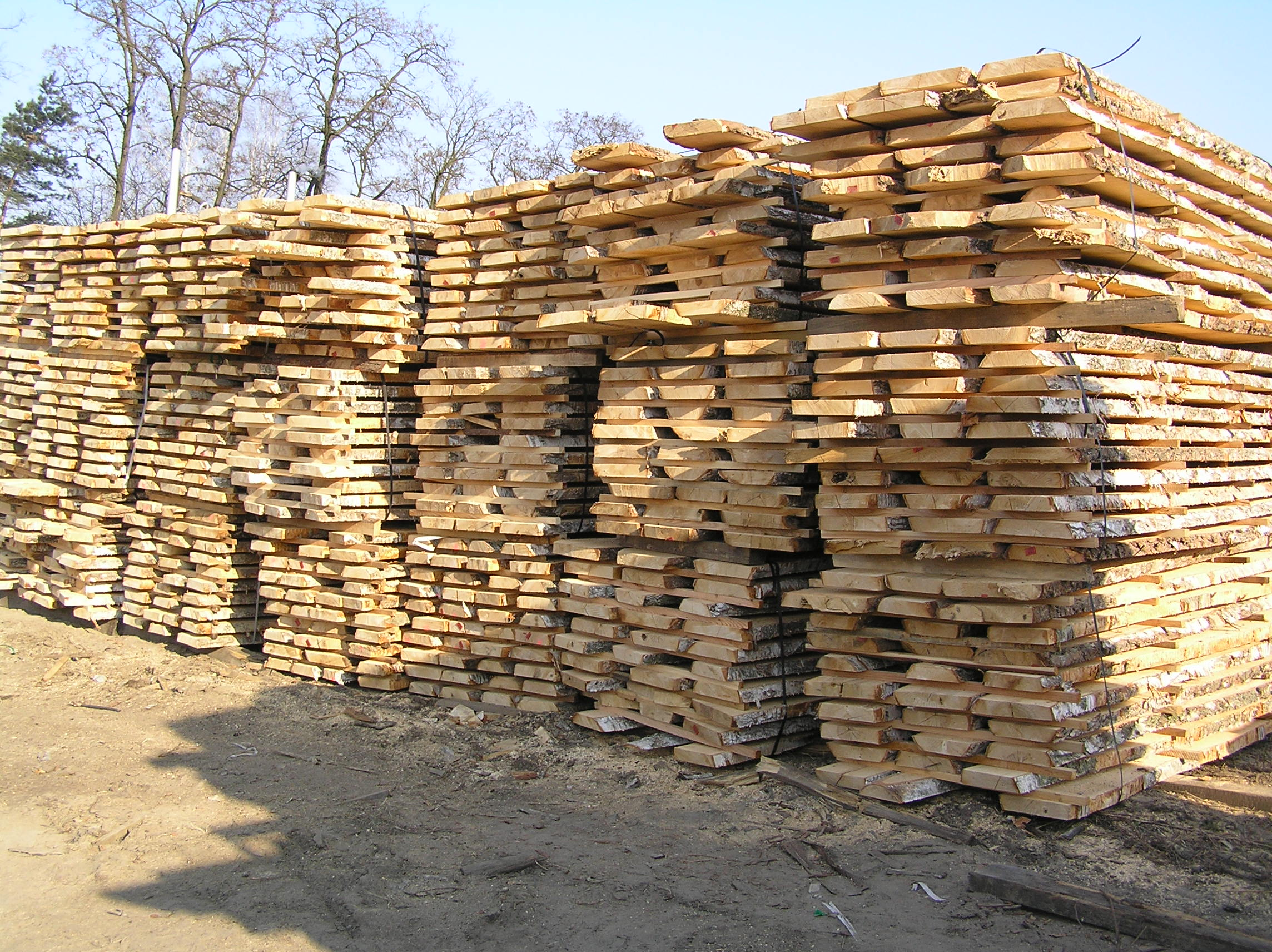 Tarcica ( tartak )